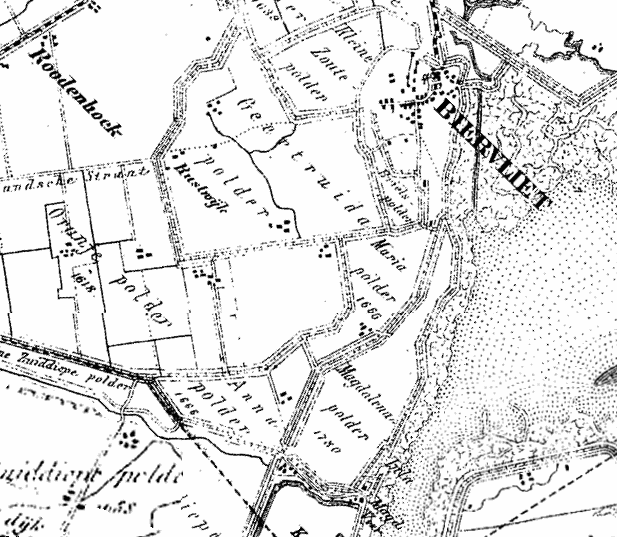 Magdalenapolder